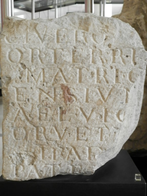 Oltárkő Matrica nevével, 267-268 körül